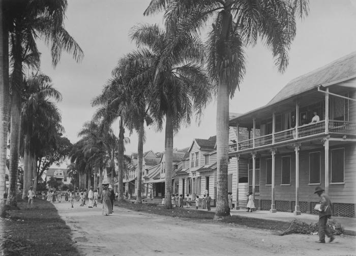 foto. De Maagdenstraat